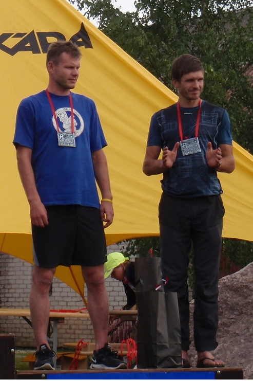 Aibast-Kraas ERC2011